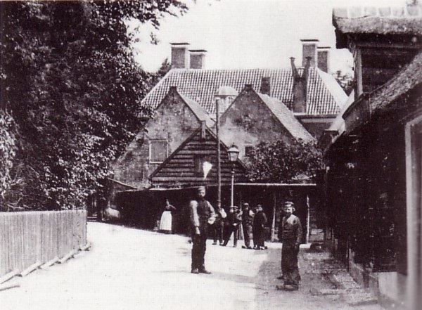 Villa Mes Délices stond op de plek van het gemeentehuis aan de Brink in Baarn, en werd in 1740 gebouwd voor rekening van schout Christiaan Plesman. In 1906 werd de villa afgebroken.